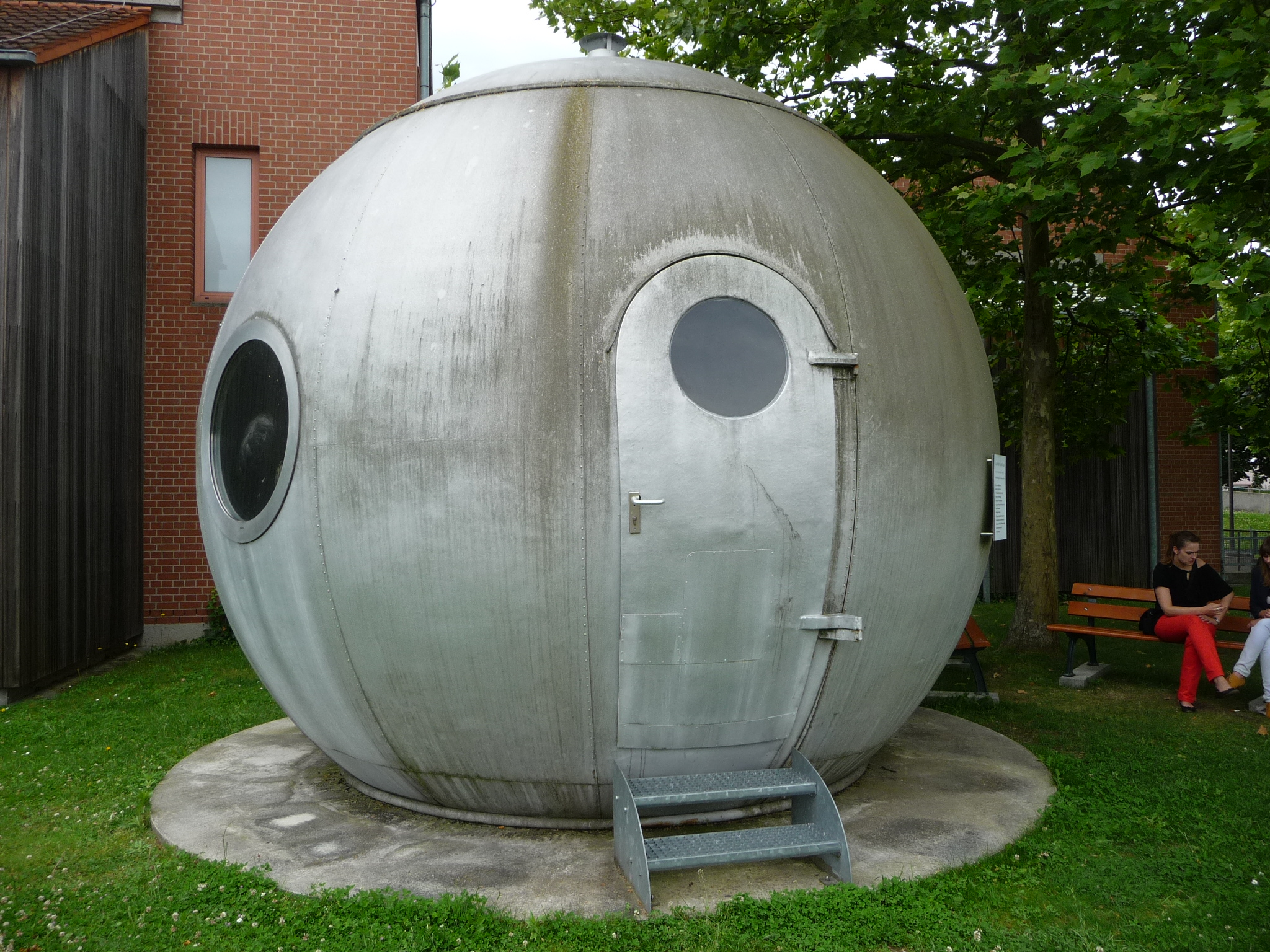 Kugelhaus in Jockgrim (Sieht aus wie eine Kugel vom Atomium in Brüssel.)